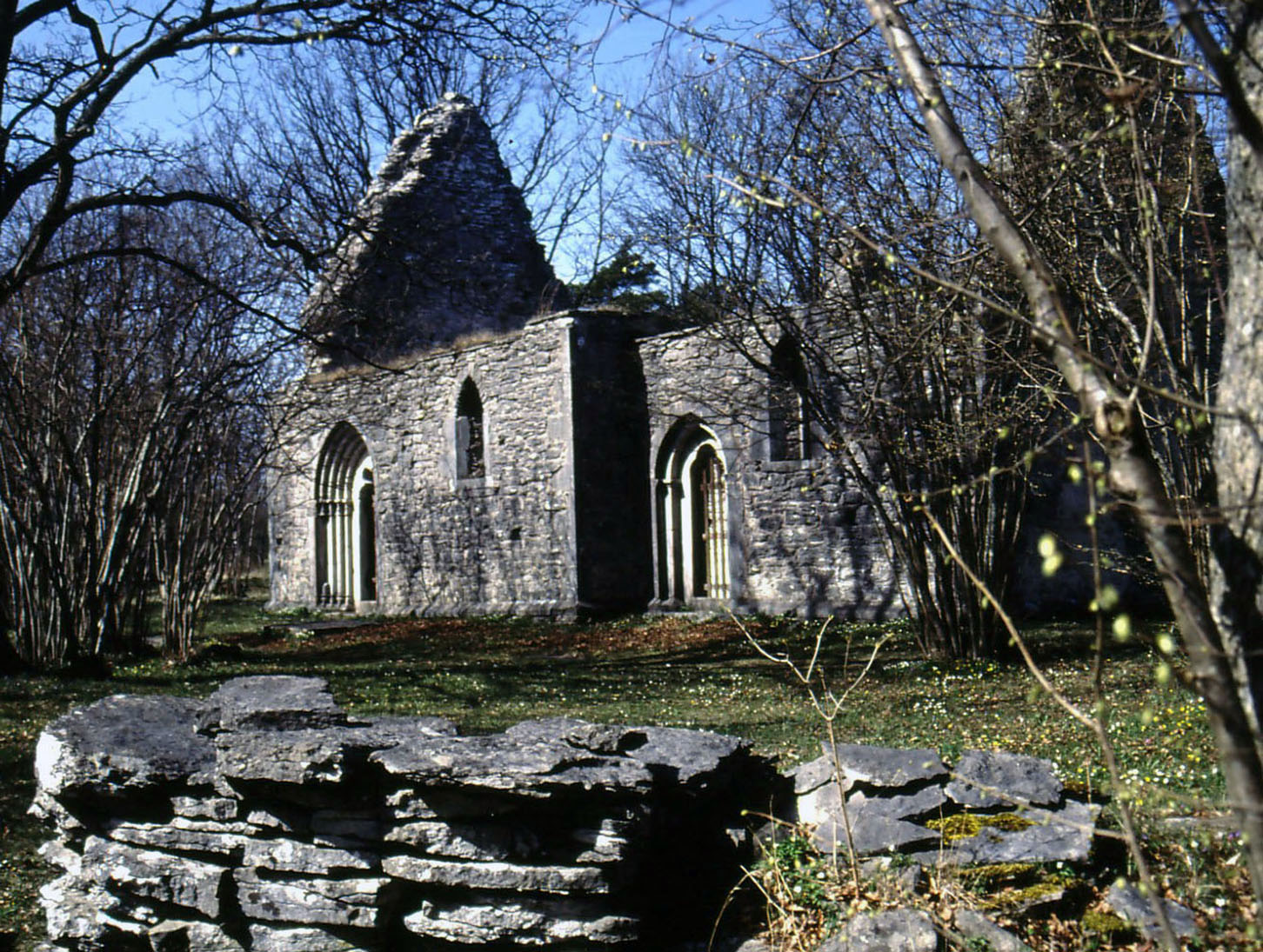 Elinghems kyrkoruin